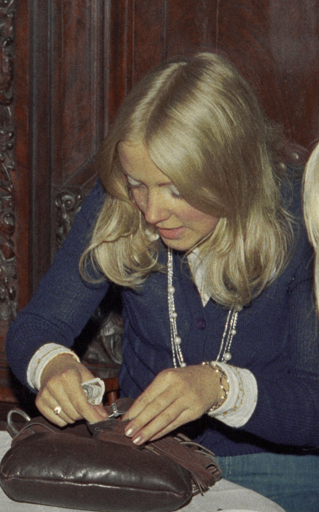 Porträt der ehemaligen Hamburger Bürgerschaftsabgeordneten Birgit Siegmund